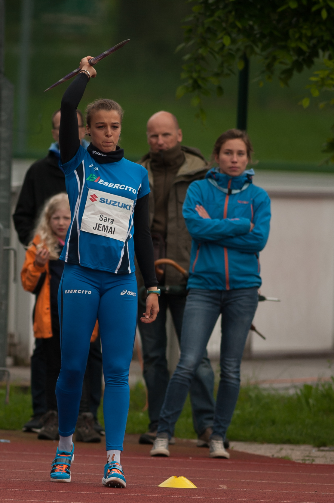 Salzburger Leichtathletik Gala am 27. Mai 2015: Sara Jemai